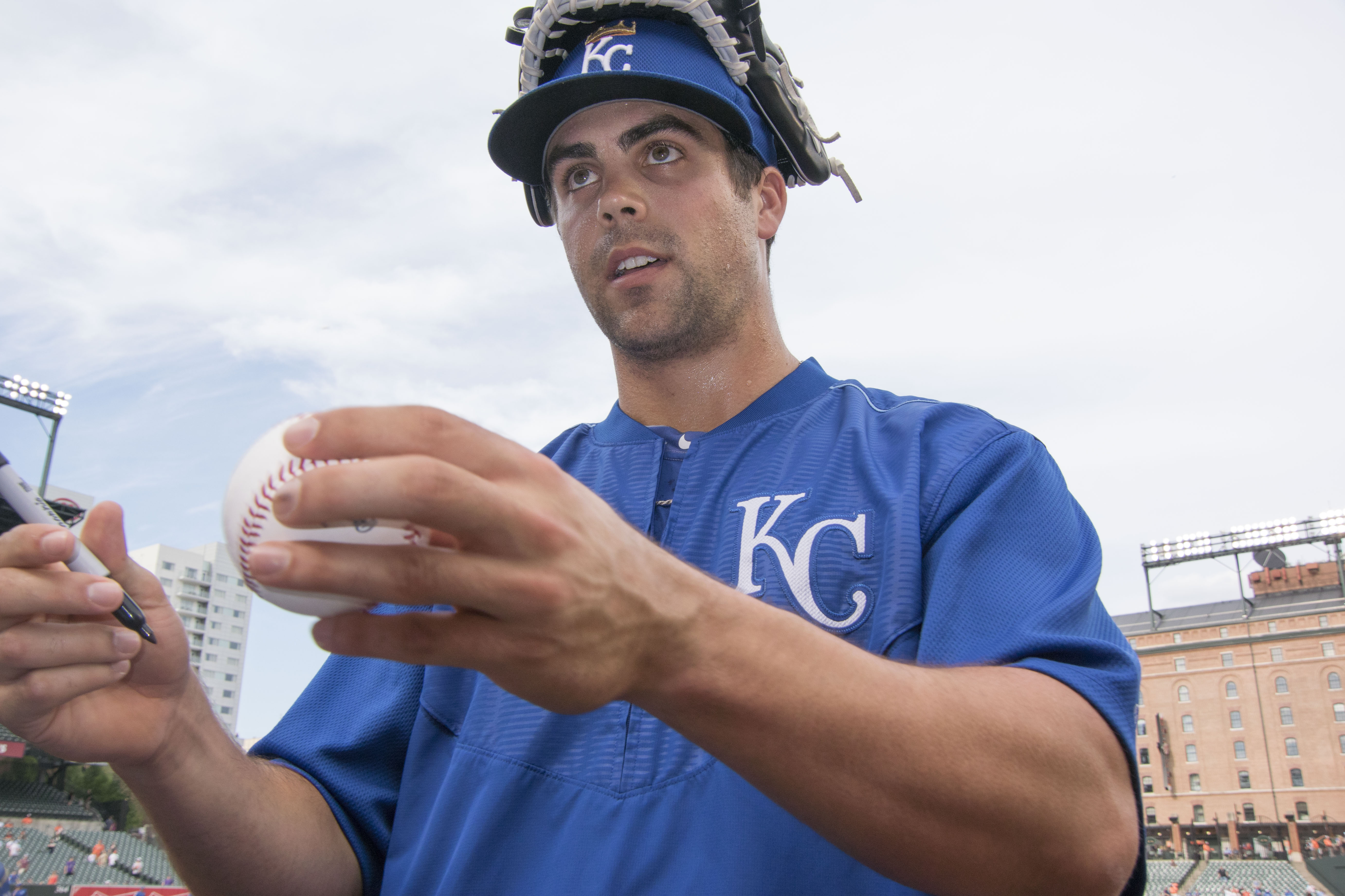 Whit Merrifield